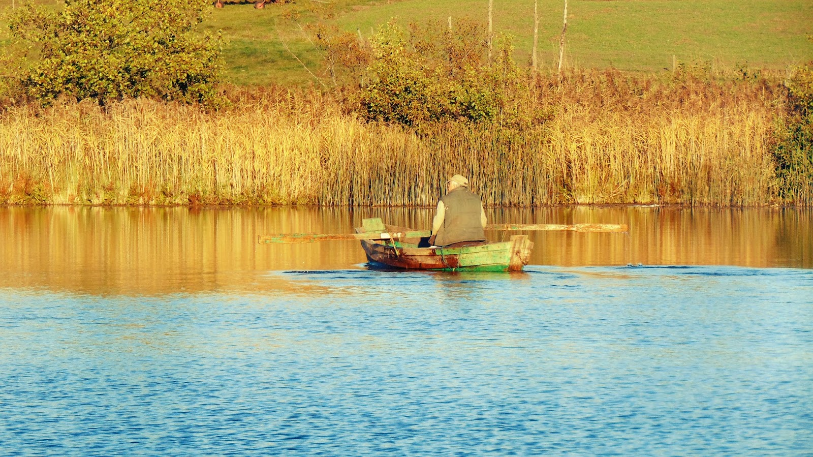 Rybak na Jeziorze Mariańskim